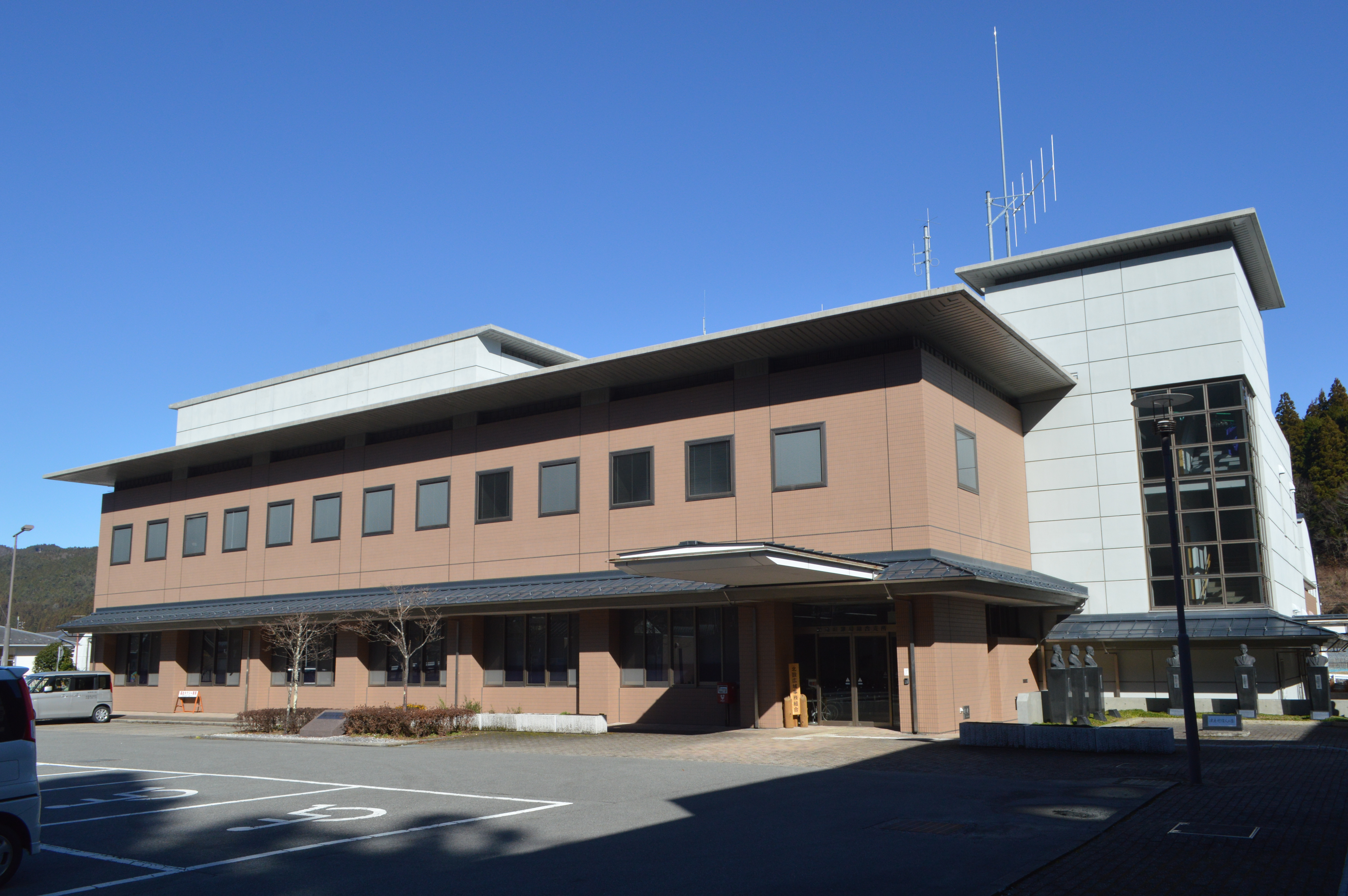 愛知県北設楽郡設楽町津具にある設楽町役場津具総合支所。旧・津具村役場。